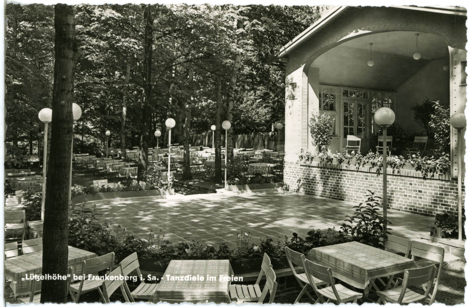 Frankenberg; Lützelhöhe, Tanzdiele This postcard is from publisher Brück & Sohn in Meißen ( postcard has a unique number 27278 and is available in a higher resolution at the publisher. This images was uploaded in a cooperation project between Wikipedians and the publisher.